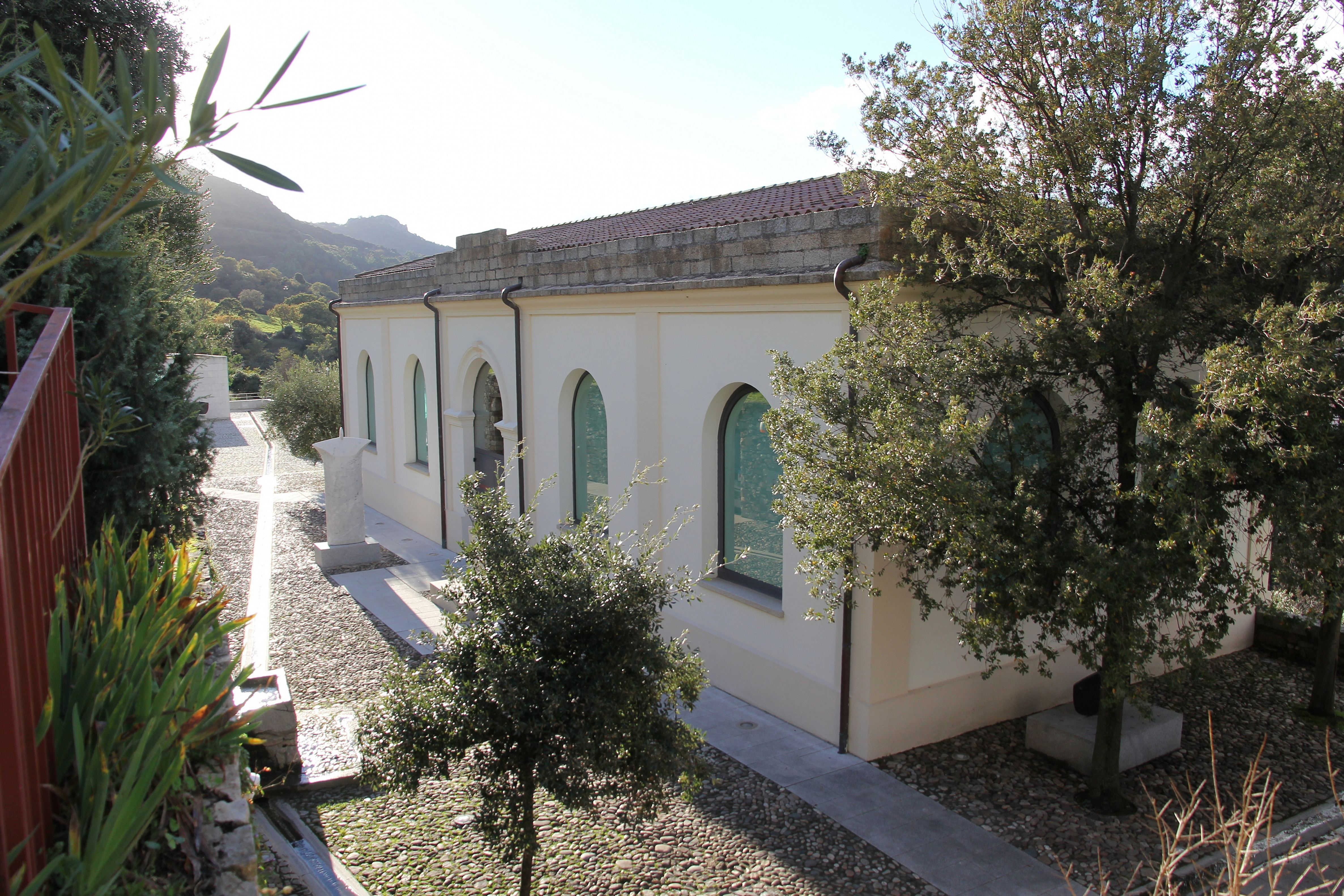 Orani, museo Costantino Nivola